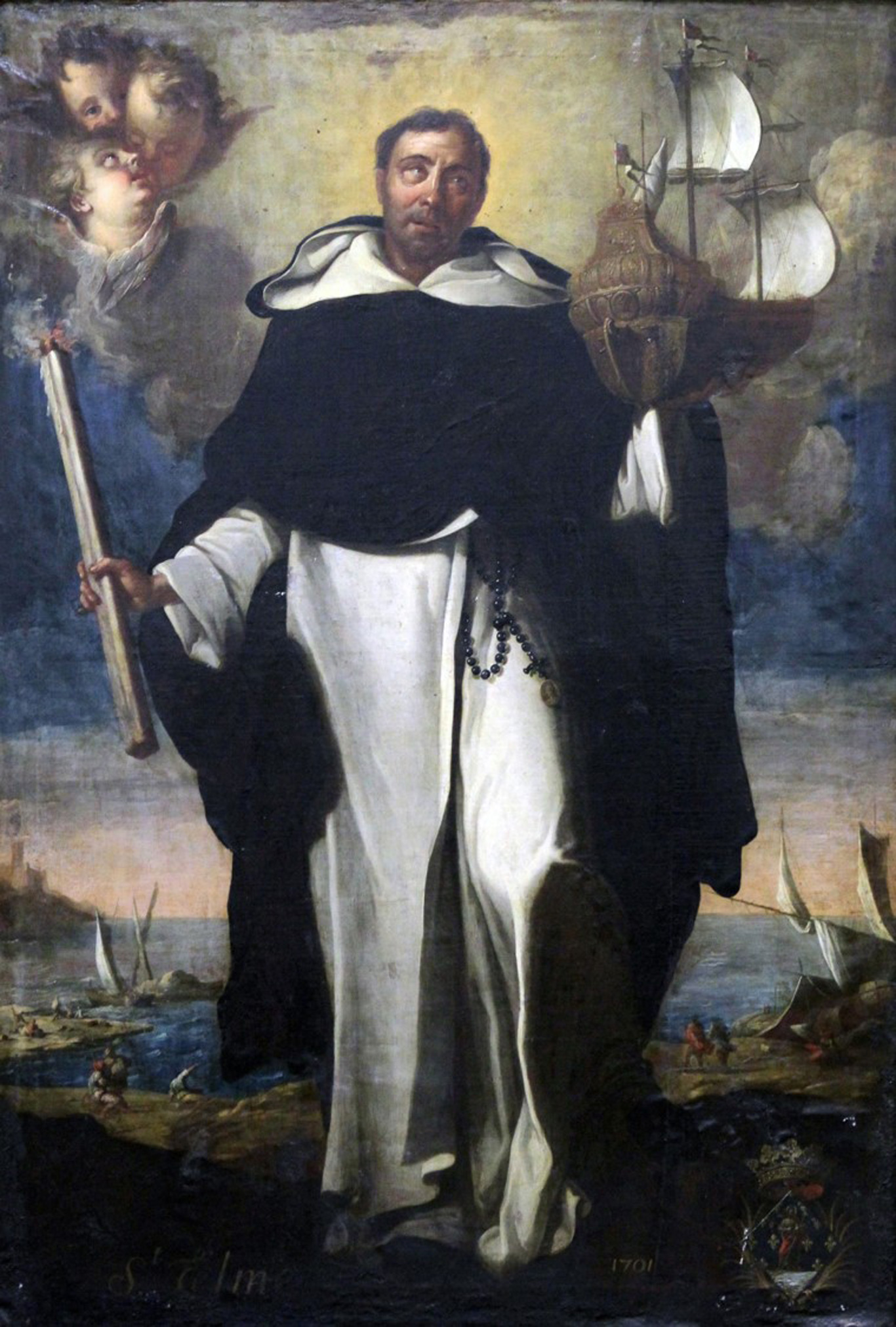 Sant Elmo (Pedro González), protector del comercio marítimo,óleo sobre tela, 199 x 134 cm, Perpignan, Musée d'art Hyacinthe Rigaud